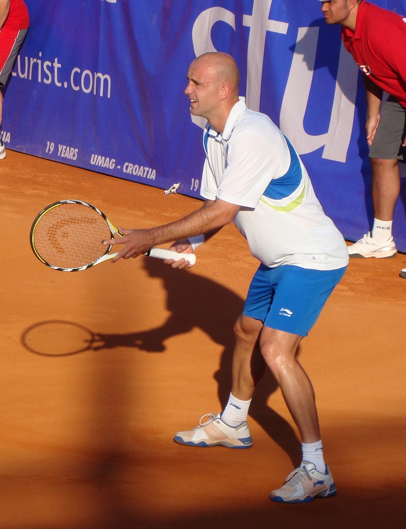 Ivan Ljubičić in Umag, Croatia